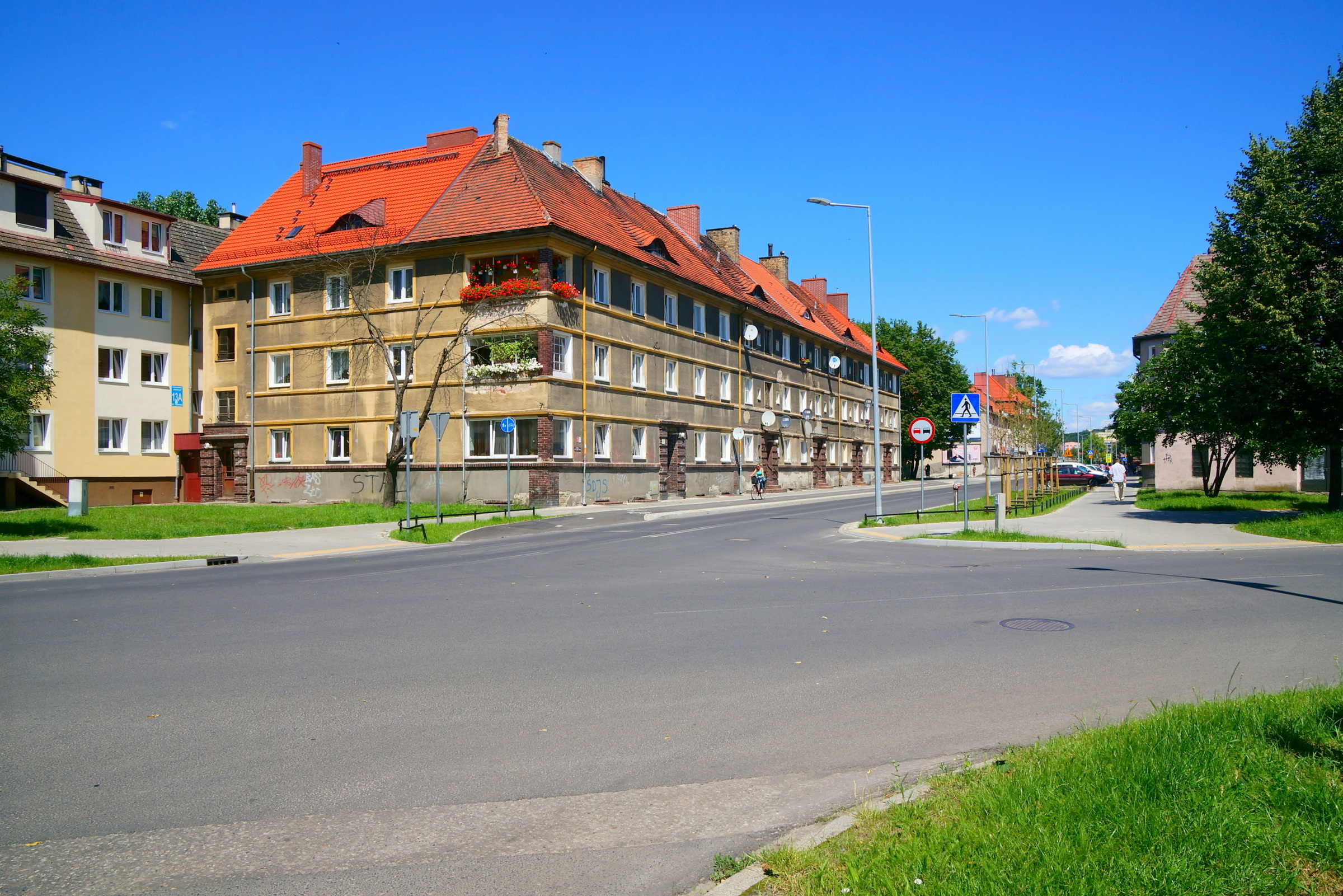 Gorzów Wlkp., ul. Towarowa na Zawarciu